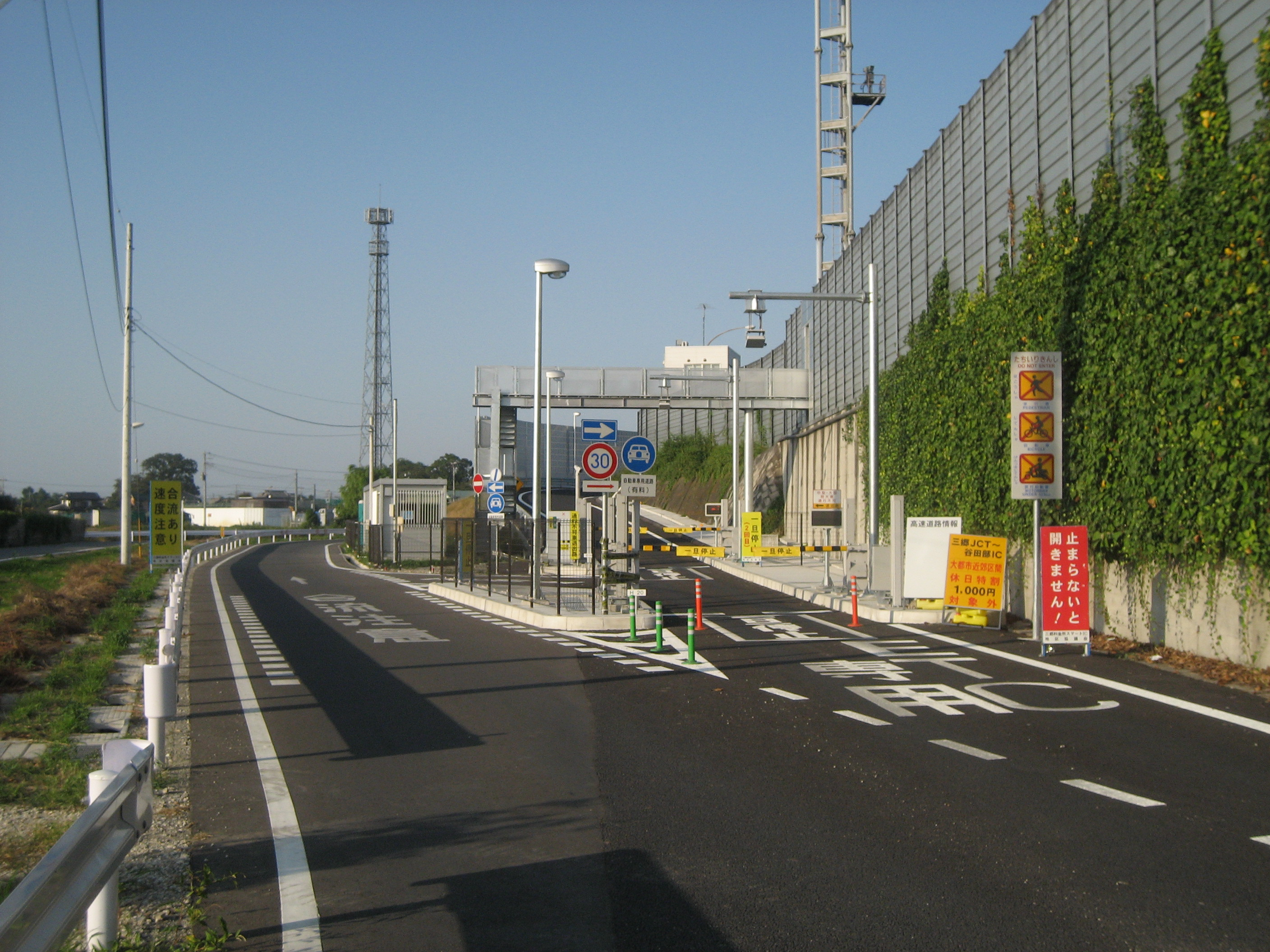 常磐自動車道下り三郷料金所スマートIC入口